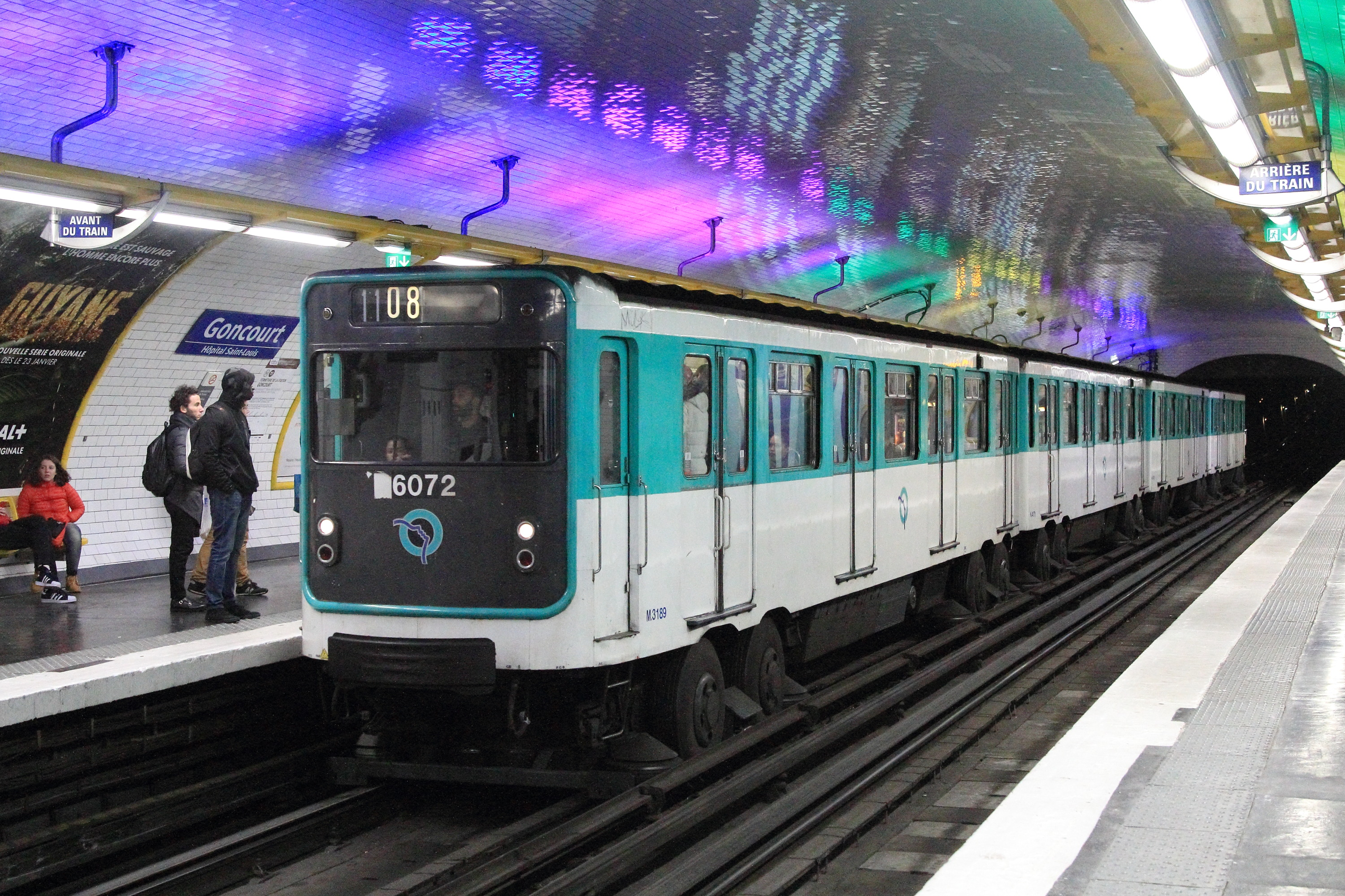 MP 59 n° 6072 à la station Goncourt du métro de Paris, en direction de Châtelet.